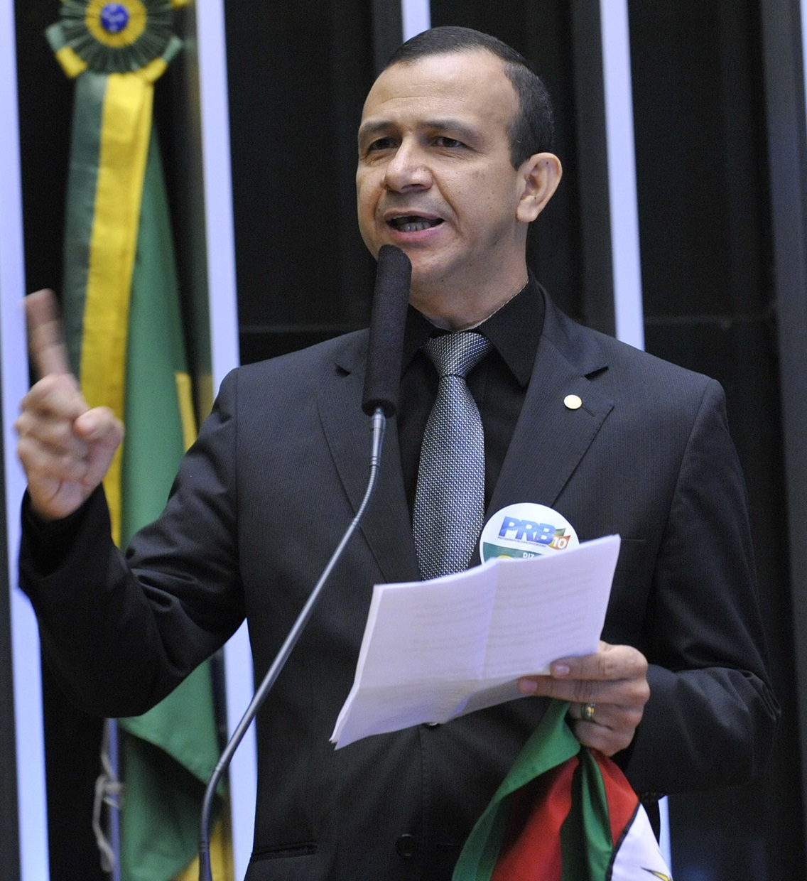 Carlos Gomes em abril de 2016.